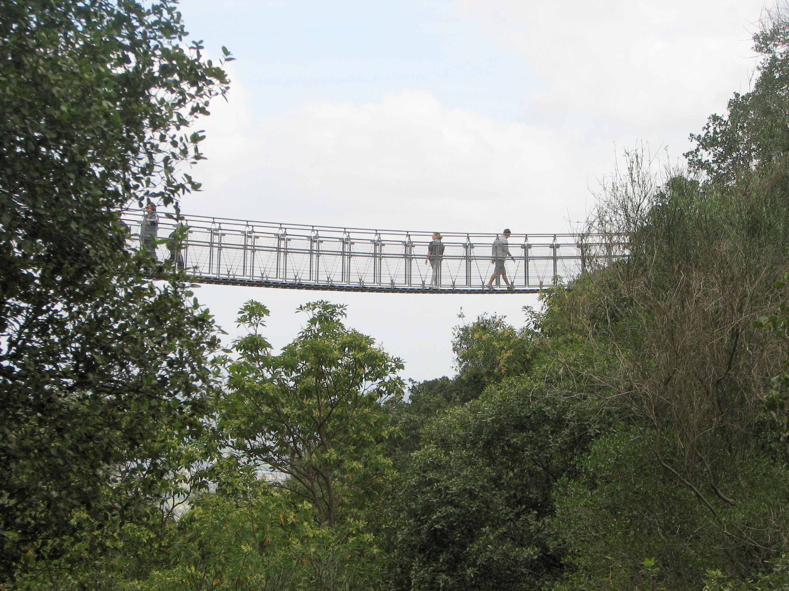 Park Nesher in the city Nesher on Mount Carmel, Israel. In the park there are 2 Suspension bridges, walking paths, Mediterranean forests, woodlands, scrub and flowers. A place for picnic, and playground. פארק נשר בעיר נשר ליד חיפה. הפארק שוכן בהר הכרמל. בפארק שני גשרים תלויים, חורש ים תיכוני, שפע פרחים, וחיות בר. בפארק אזור המיועד לפיקניק שולחנות וספסלים וכן מגרש משחקים לילדים. בואדי קטיע העובר בפארק מסלולי הליכה מסומנים העוברים בואדי ועל מורדותיו. ומערה פרהיסטורית. בפארק גם דרך העוברת על צלע ההר ישירות לגשרים, בה ניתן ללכת גם עם עגלות ילדים וכן ספסלי ישיבה ומרפסות תצפית. מהואדי ניתן לראות תצפיות על אוניברסיטת חיפה ועל שכונותיה של העיר נשר